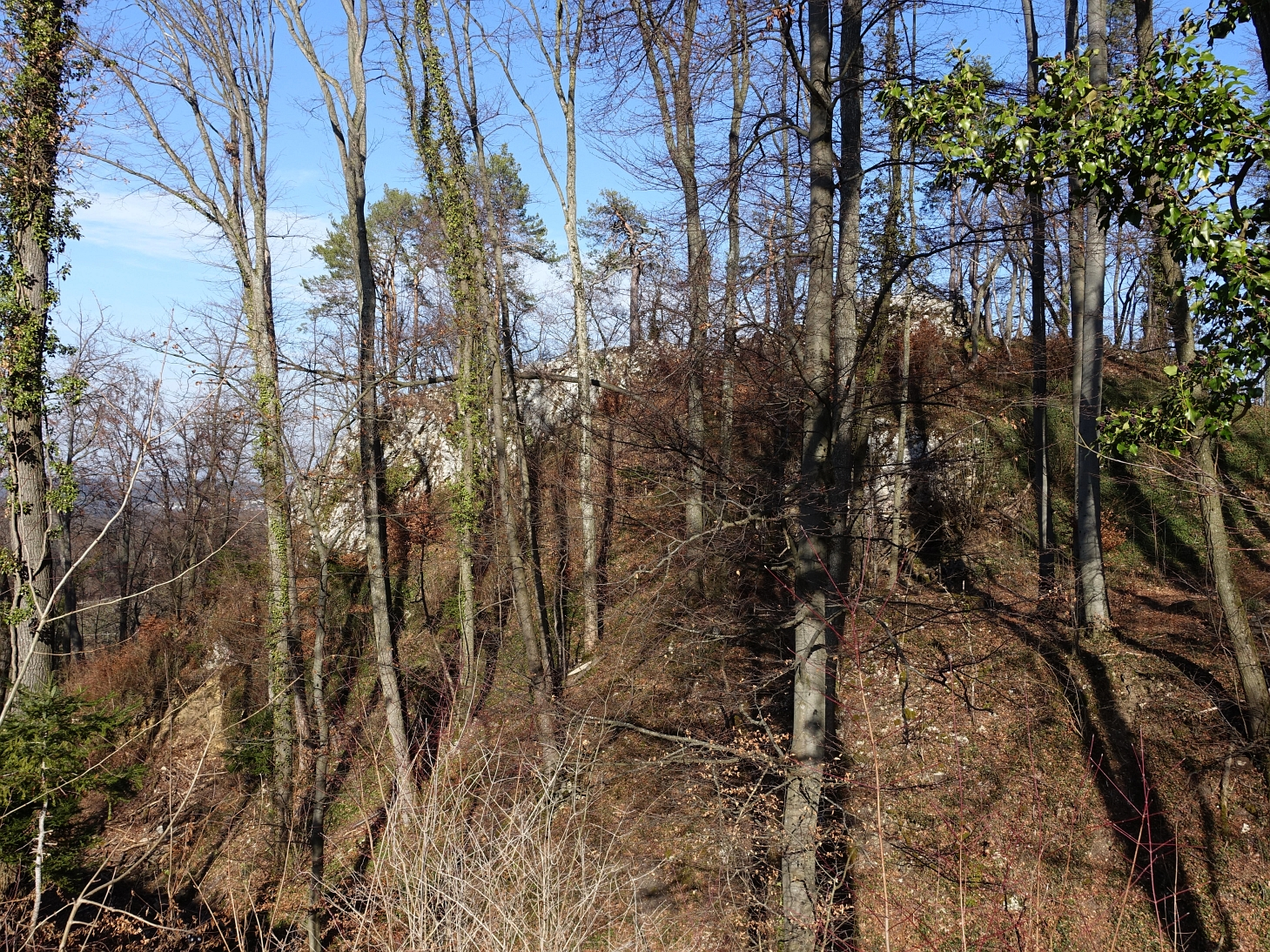 Ruine Münchsberg, Aesch, Basel Land, Schweiz